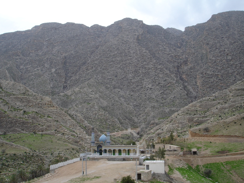 امامزاده شاه فرج الله علامرودشت